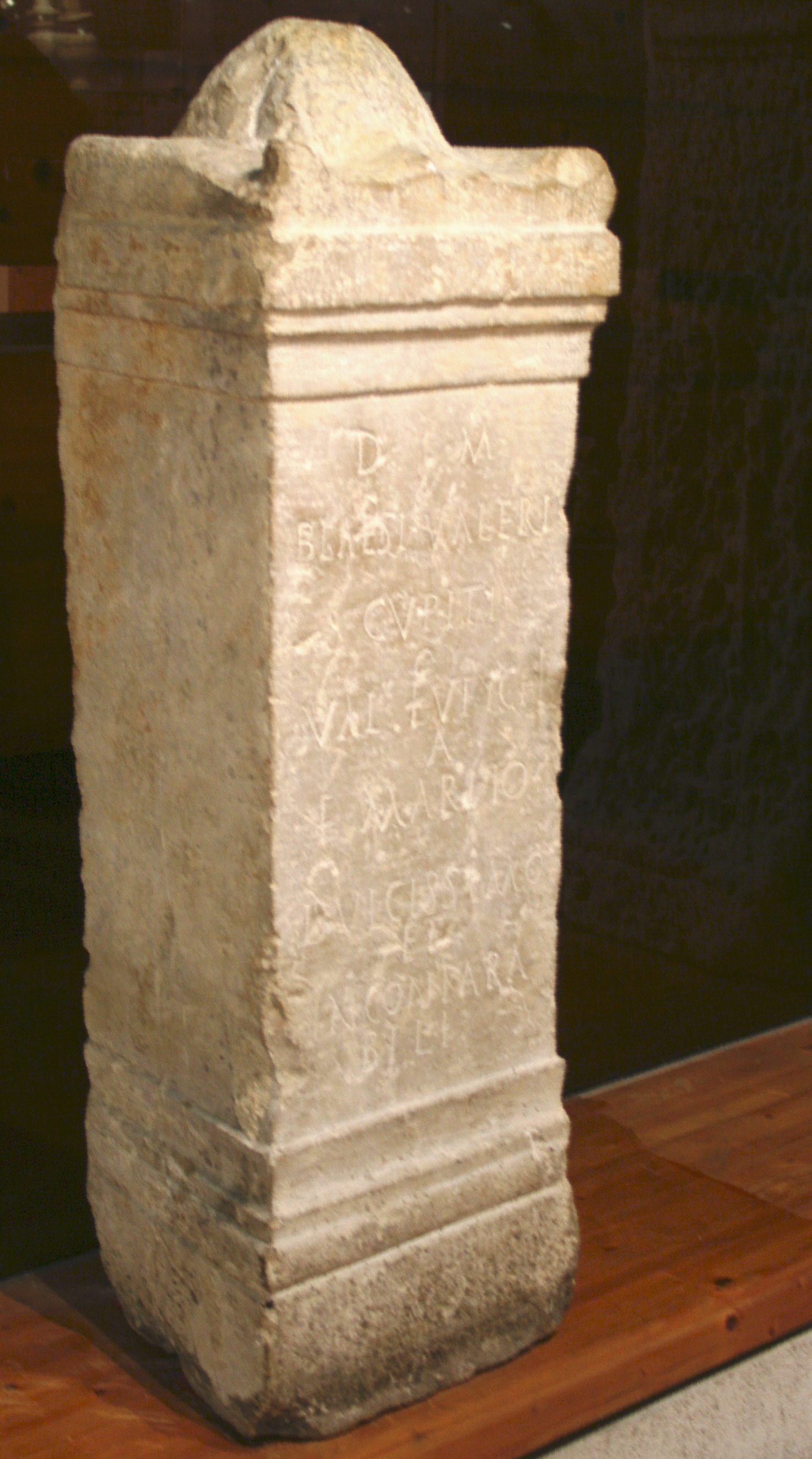 Cippe funéraire de 1.20 mètre de haut et de 0.40 mètre de large trouvé aux allées de Meilhan (en haut de la canebière) à Marseille en 1975. Il est en calcaire de Cassis, dédié aux mânes de Blaesus Valerius. AE 2005, 1045: D(is) M(anibus)/ Blaesi Valeri/ Cupiti/ Val(eria) Eutychi/a f(ecit) marito/ dulcissimo/ et / inco para/bili